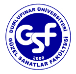 Dumlupınar Üniversitesi Güzel Sanatlar Fakültesi Logosu